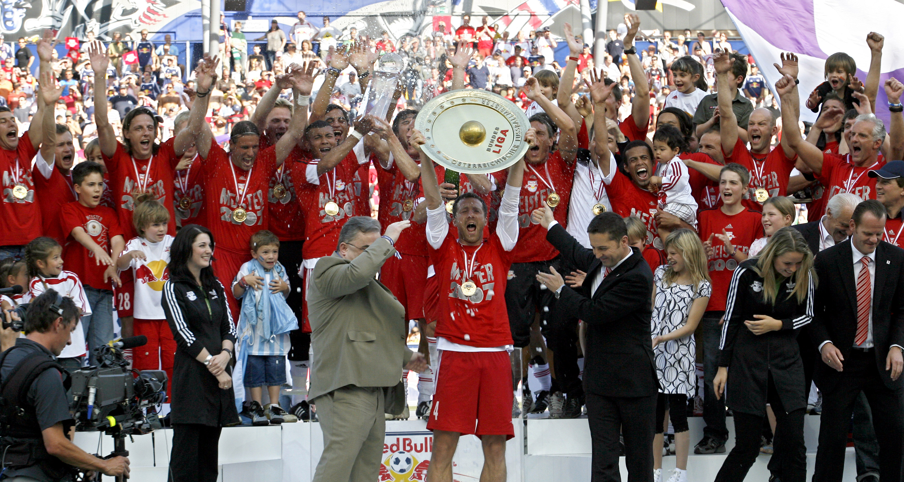 FC Red Bull Salzburg - Austrian Champion 2007